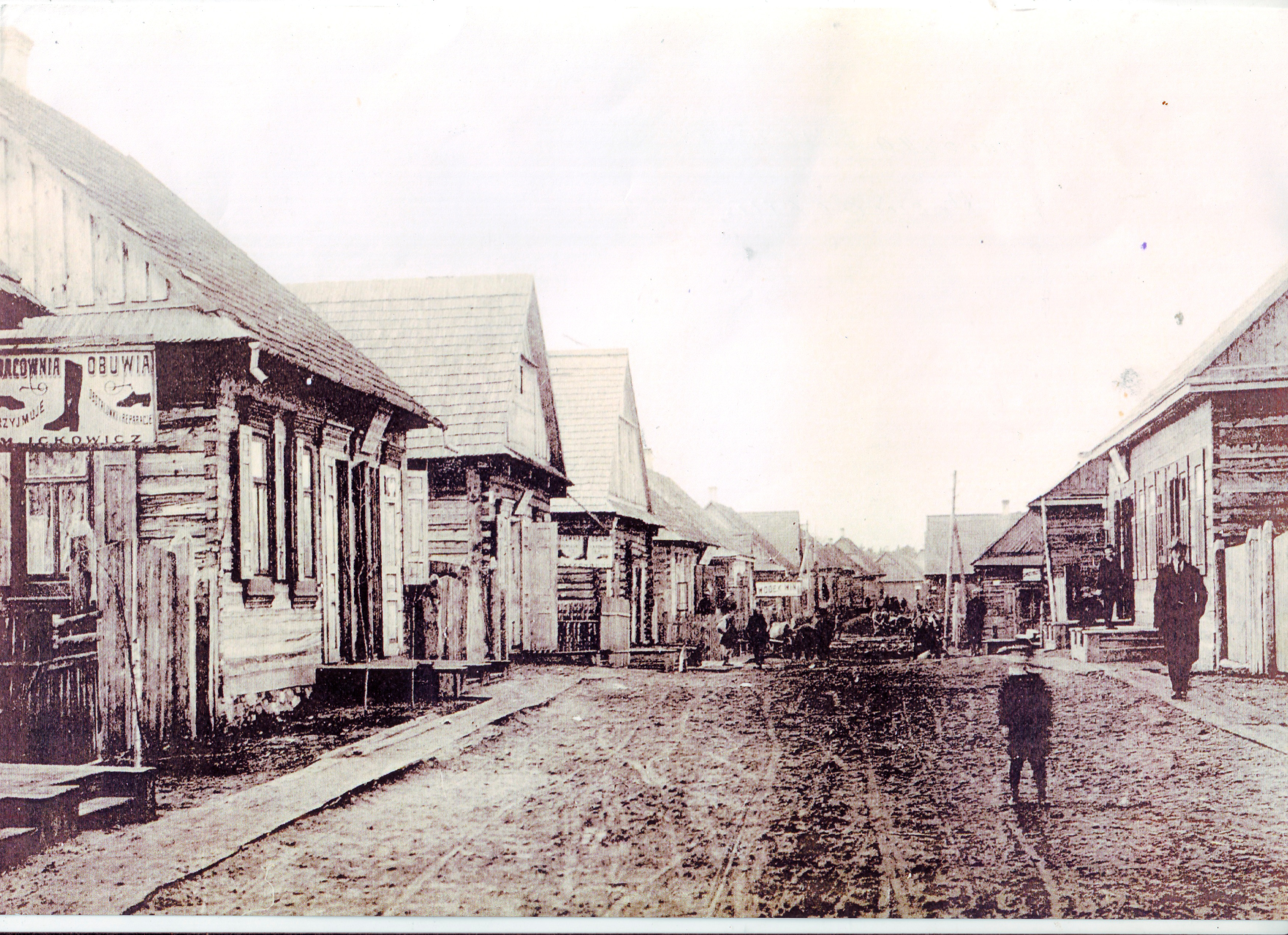 Телеханы, улица Костельная. Начало XX века.